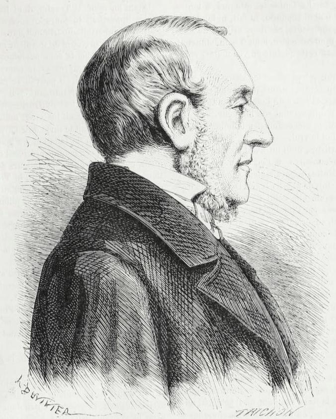 M. de Goulard